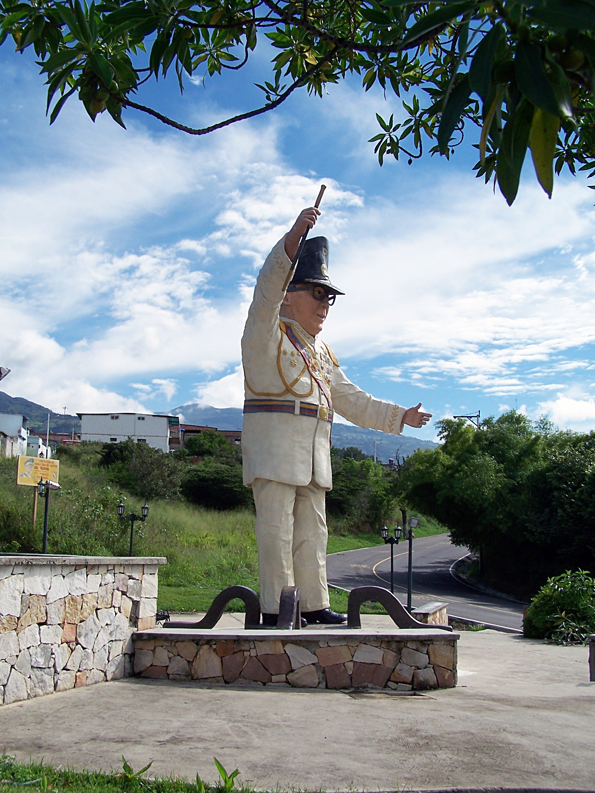 Obra situada en la entrada a la población Tachirense de Michelena, pueblo natal del personaje.